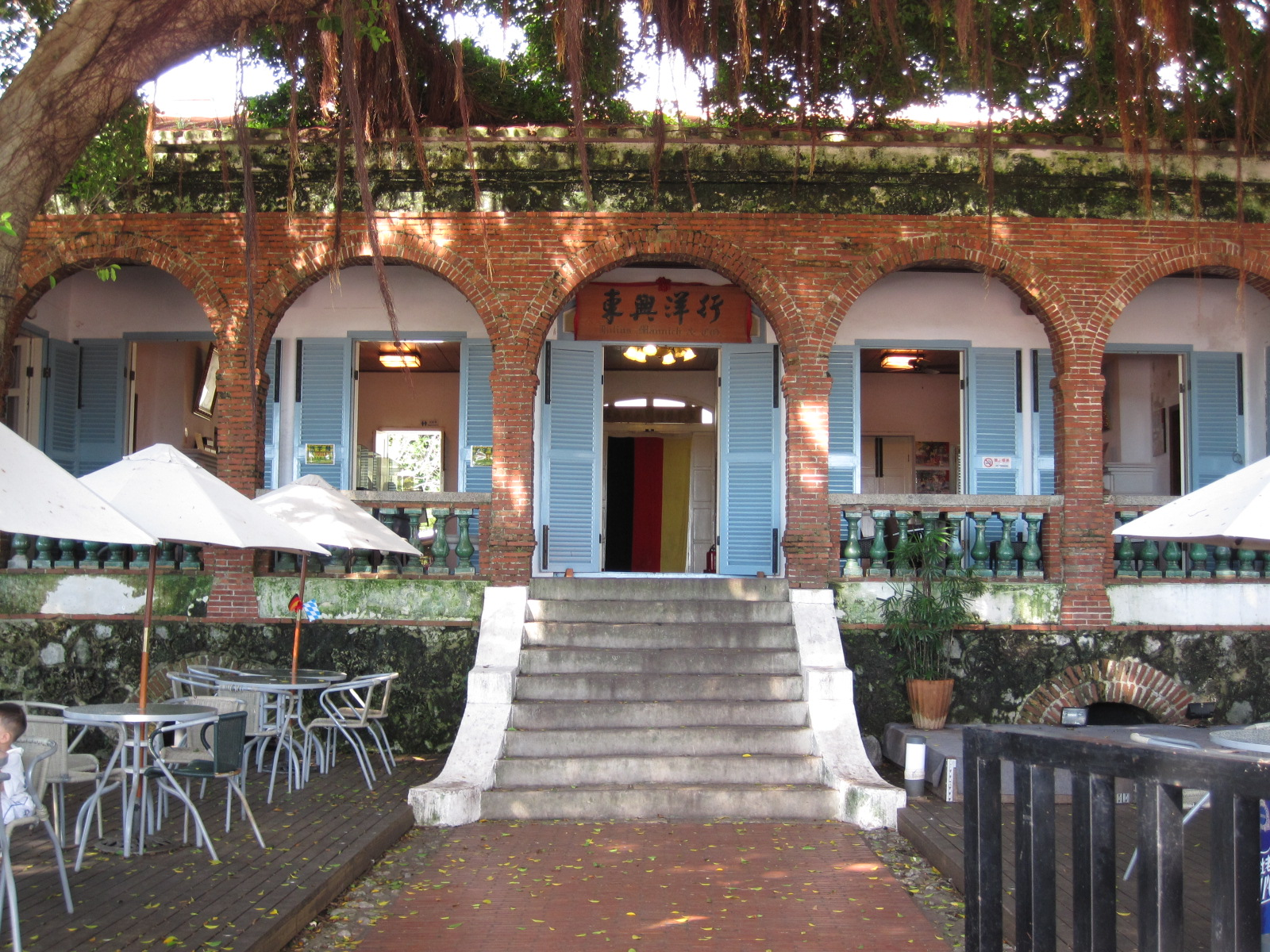 臺南東興洋行